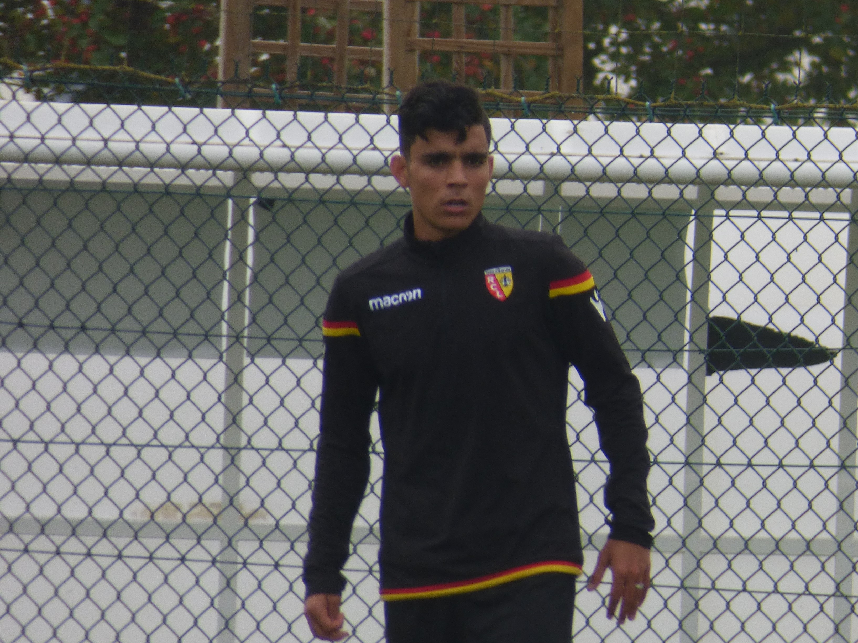 Achraf Bencharki lors d'un entraînement public du Racing Club de Lens, le 13 septembre 2018, au Centre technique et sportif de La Gaillette à Avion.